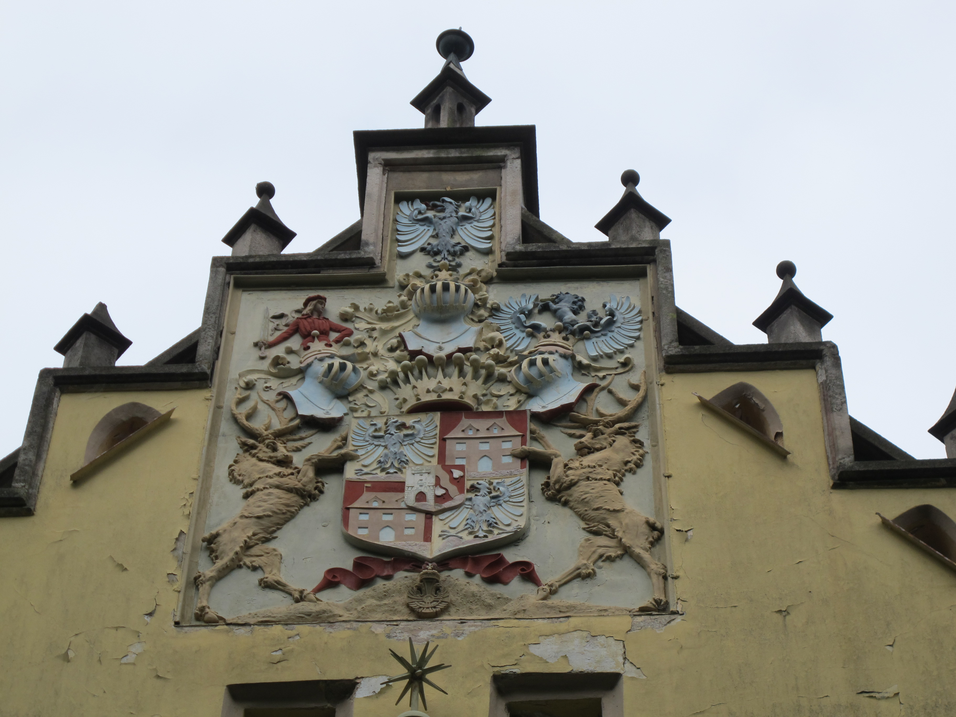 Zámeček Berchembogen - znak This image was acquired during the event Wikiměsto Mariánské Lázně.